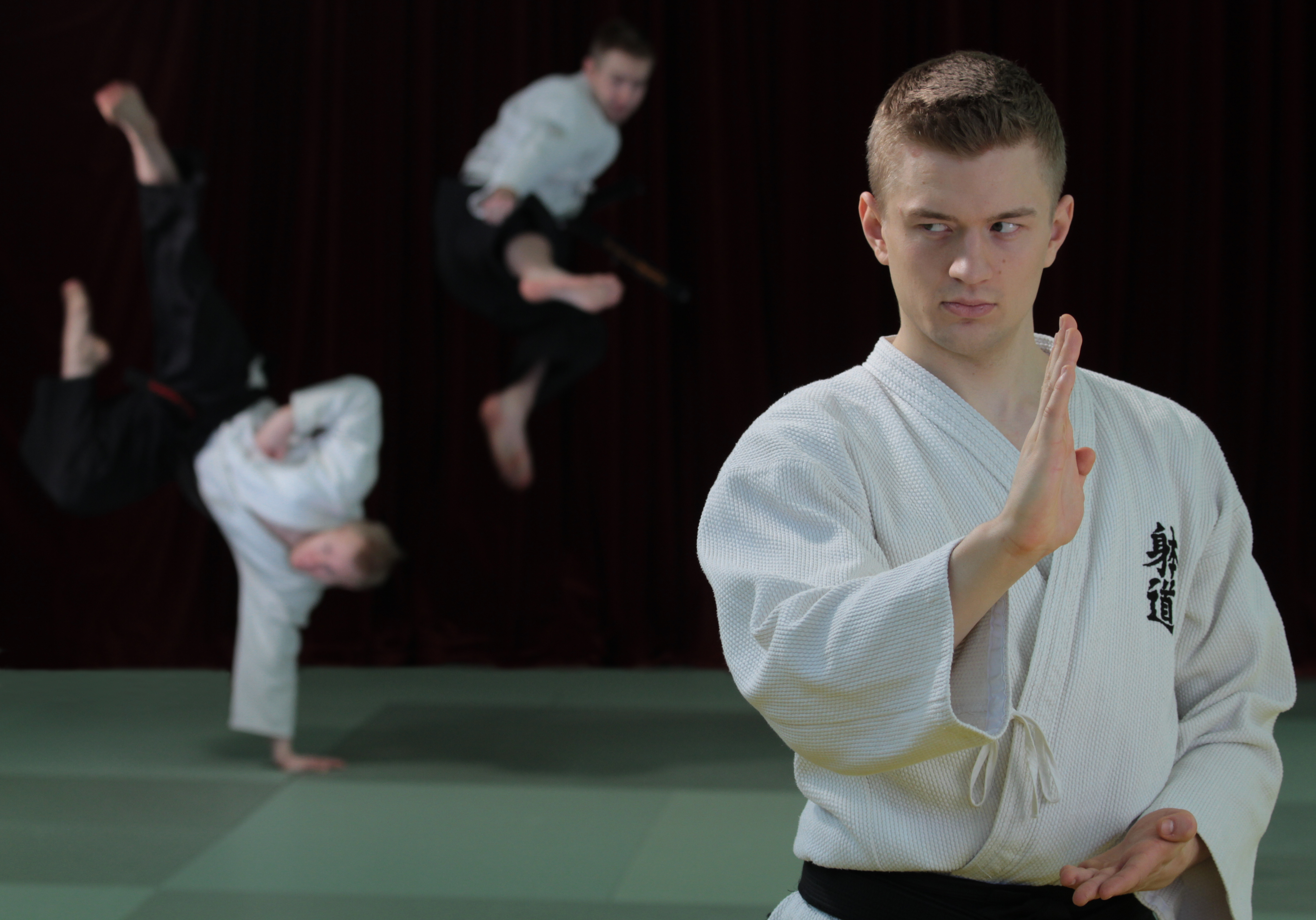 Jere Tuulkari, Suomen Taidoliiton promootiokuva